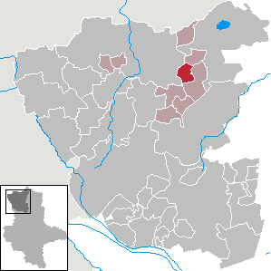 (Original text: Rademin im Altmarkkreis Salzwedel)